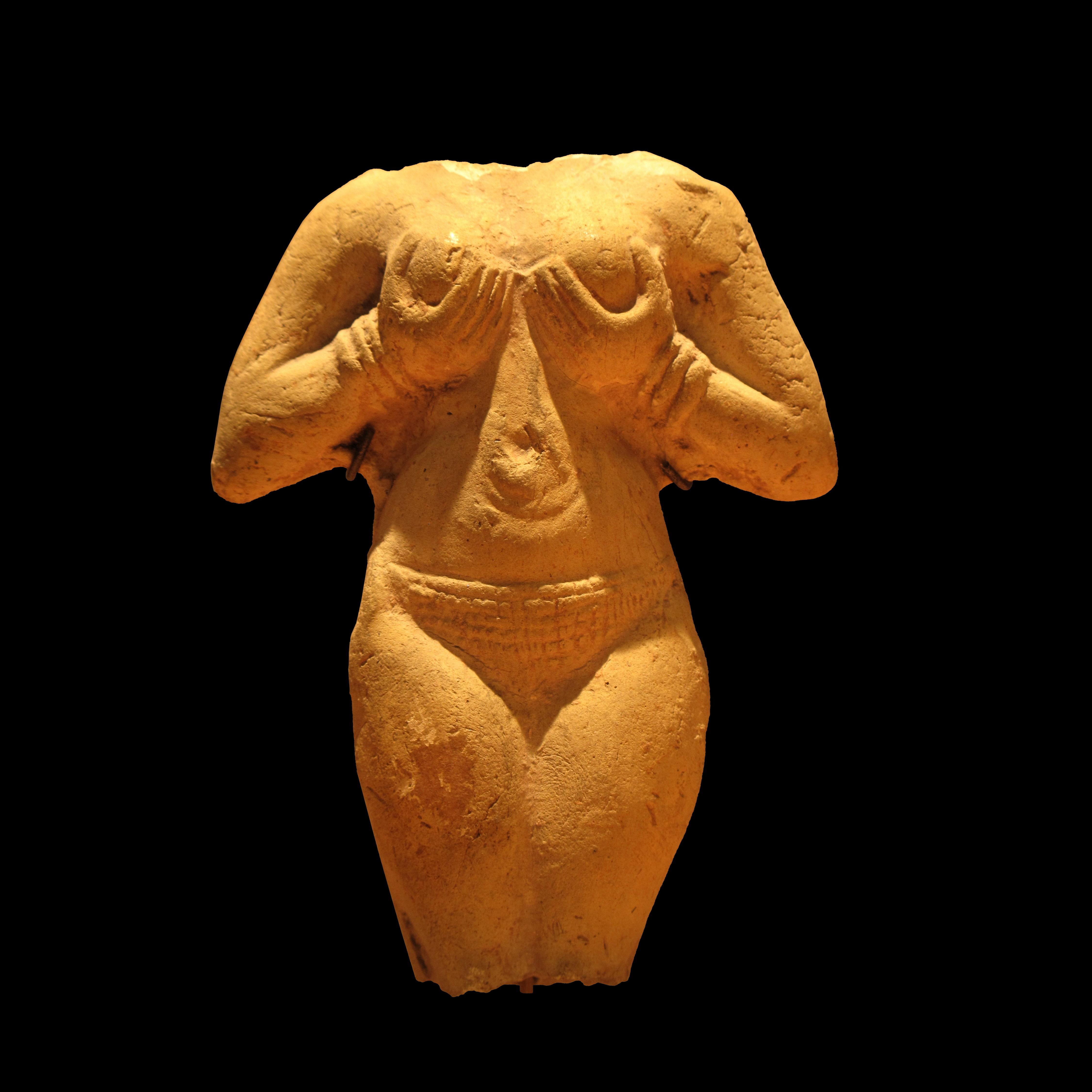 Female statuette, Suse.